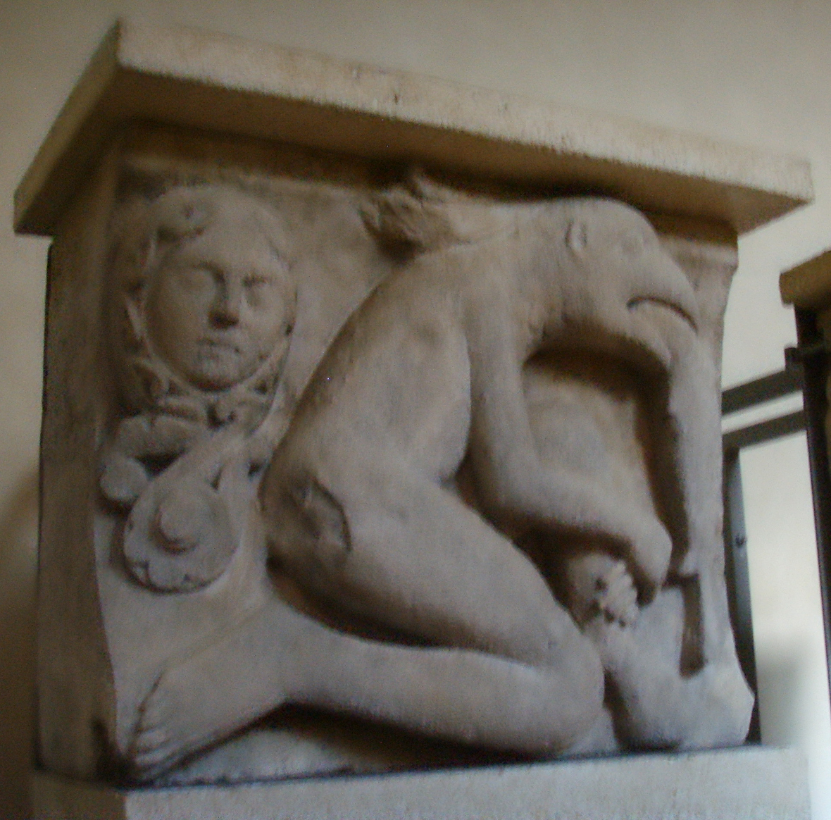 duomo di modena